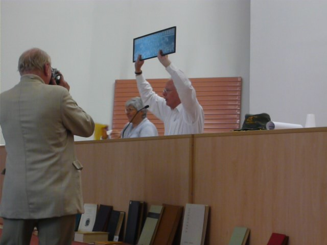 Universala Kongreso de Esperanto en Bjalistoko, Pollando, 2009. Kongresa aŭkcio.